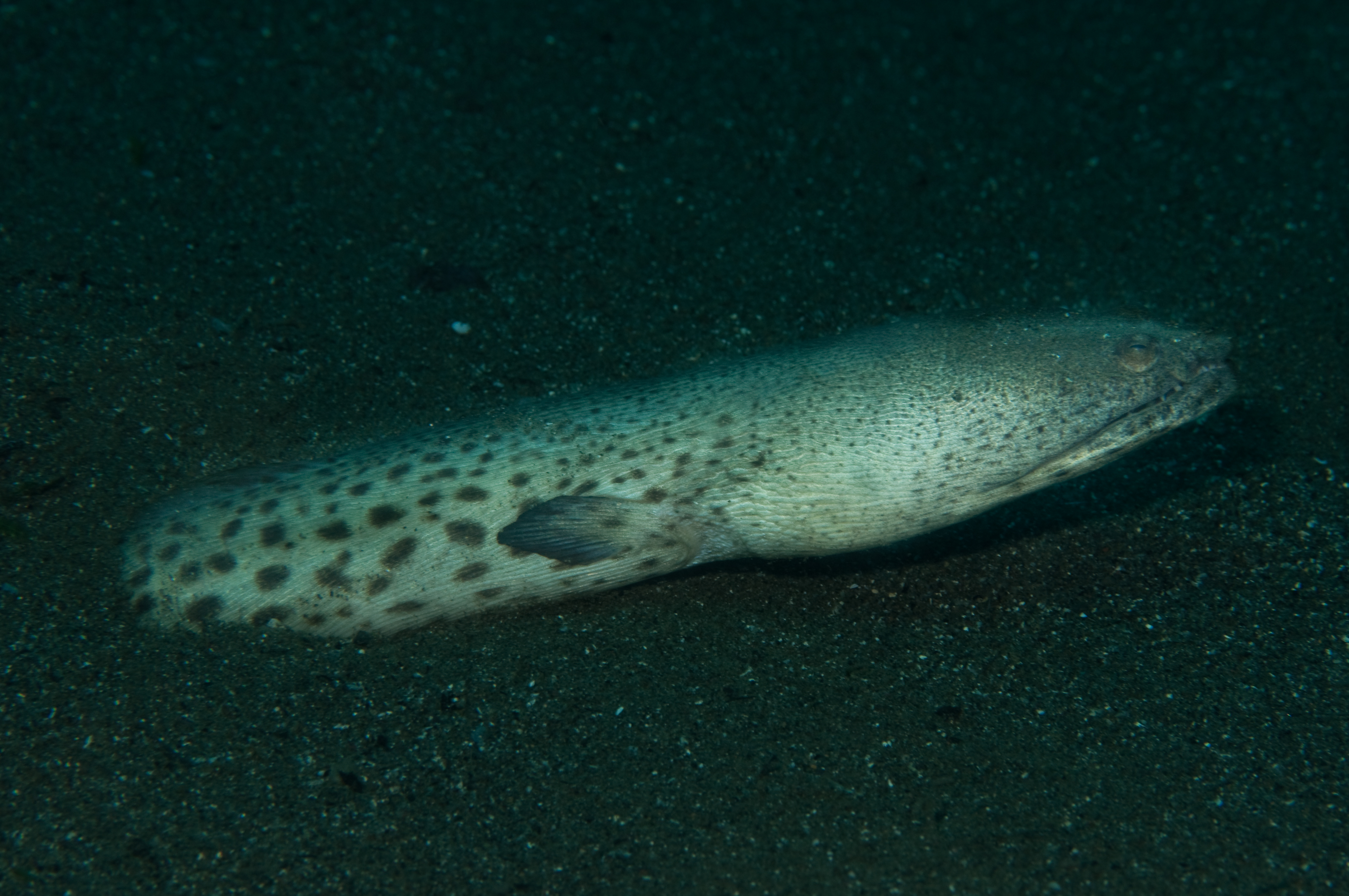 My Social Media Personae